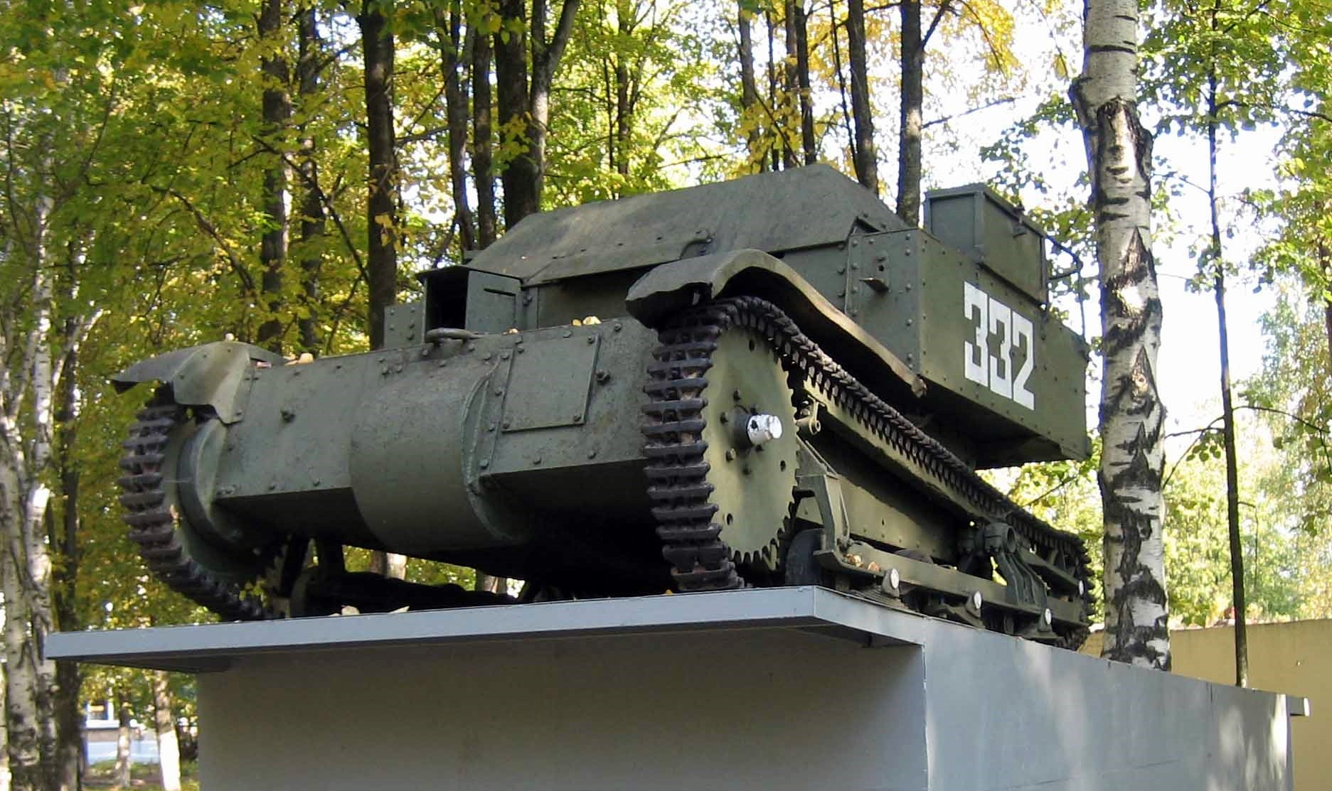 Soviet tankette T-27 in Kubinka tank museum, Russia.